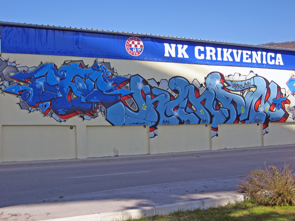 Grafiti na vanjskome zidu crikveničkog nogometnog igrališta